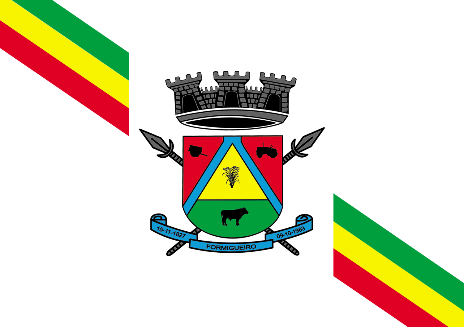 Bandeira de Formigueiro